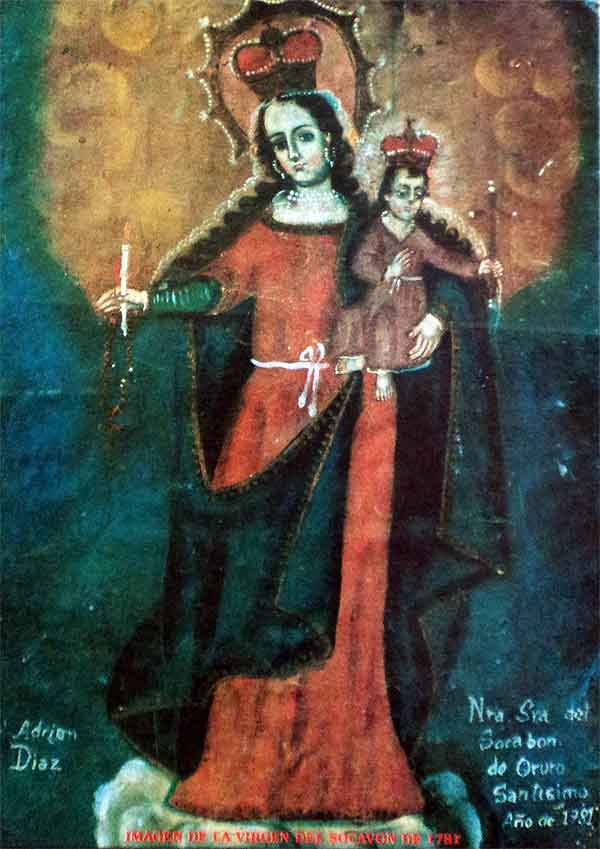 Fotografia de la pintura de la Virgen del Socavon (Virgen Candelaria) de 1781, en Oruro Bolivia, actualmente existe una coleccion fotografia en santuario del socavon desde esa fecha.